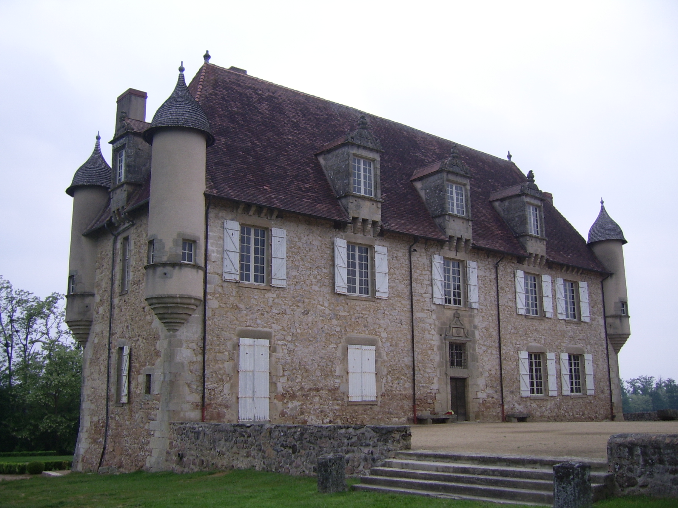 Château de la Borie (Solignac, Haute-Vienne, France)